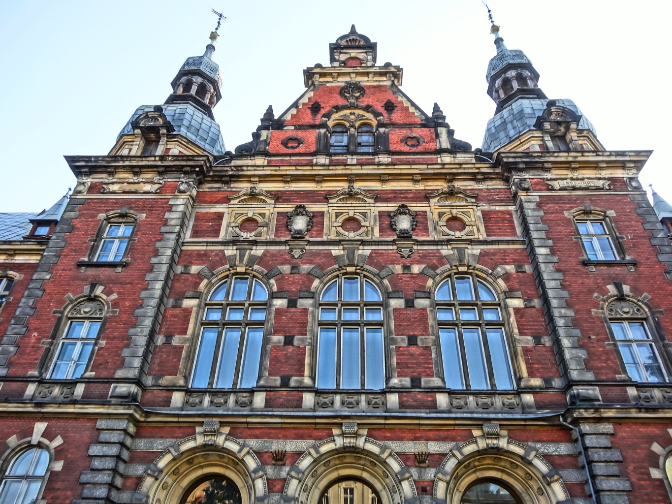 Budynek dawnej dyrekcji Kolei Wschodniej w Bydgoszczy, ul. Dworcowa 63, zbud. 1886-1889, od 2013 r. w gestii Collegium Medicum UMK